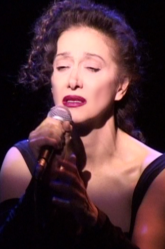 Sapho